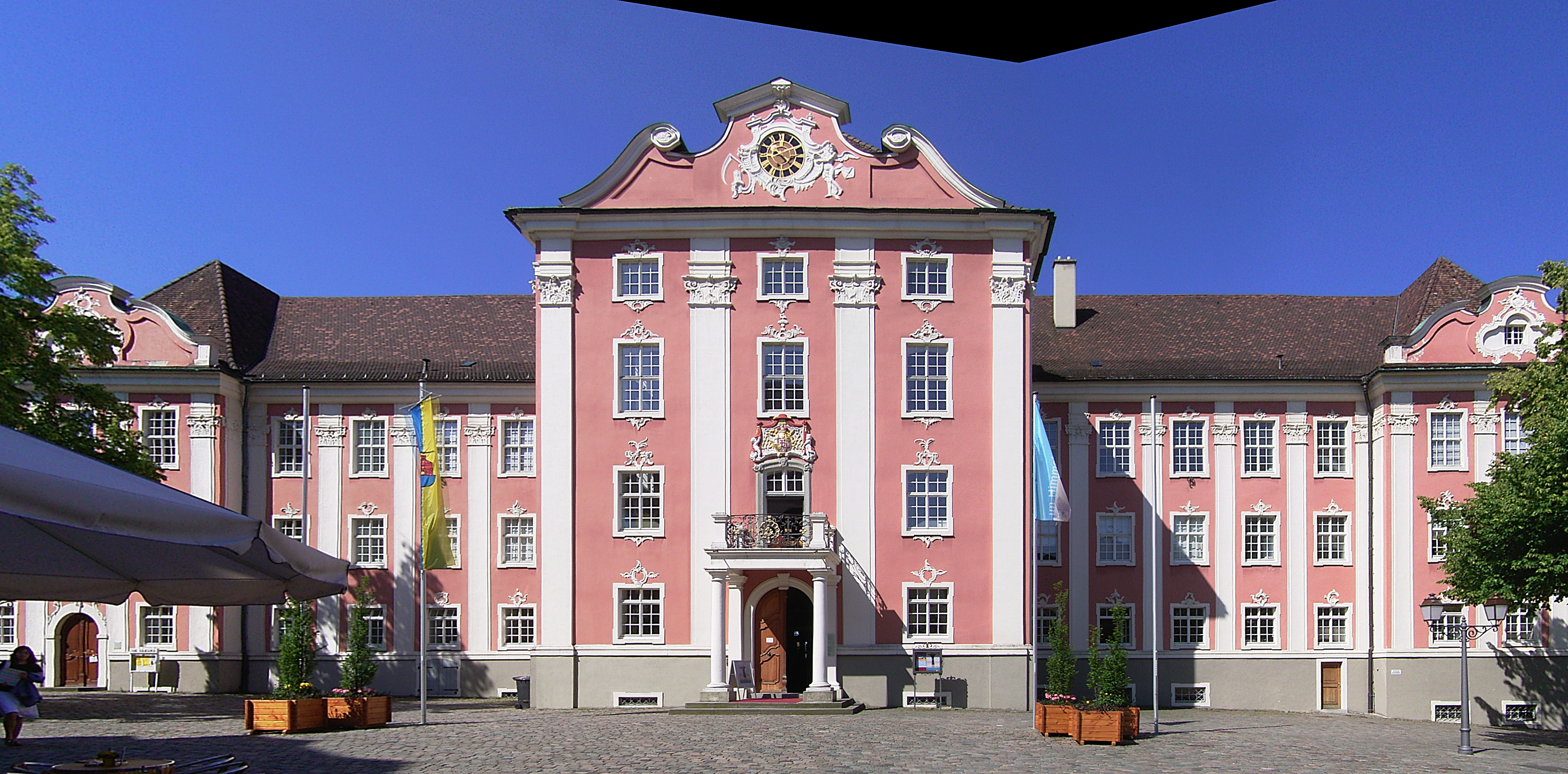 Panoramabild des neuen Schlosses in Meersburg, aus der Bilderwerkstatt aus 3 Bildern zusammengesetzt, unbearbeitet